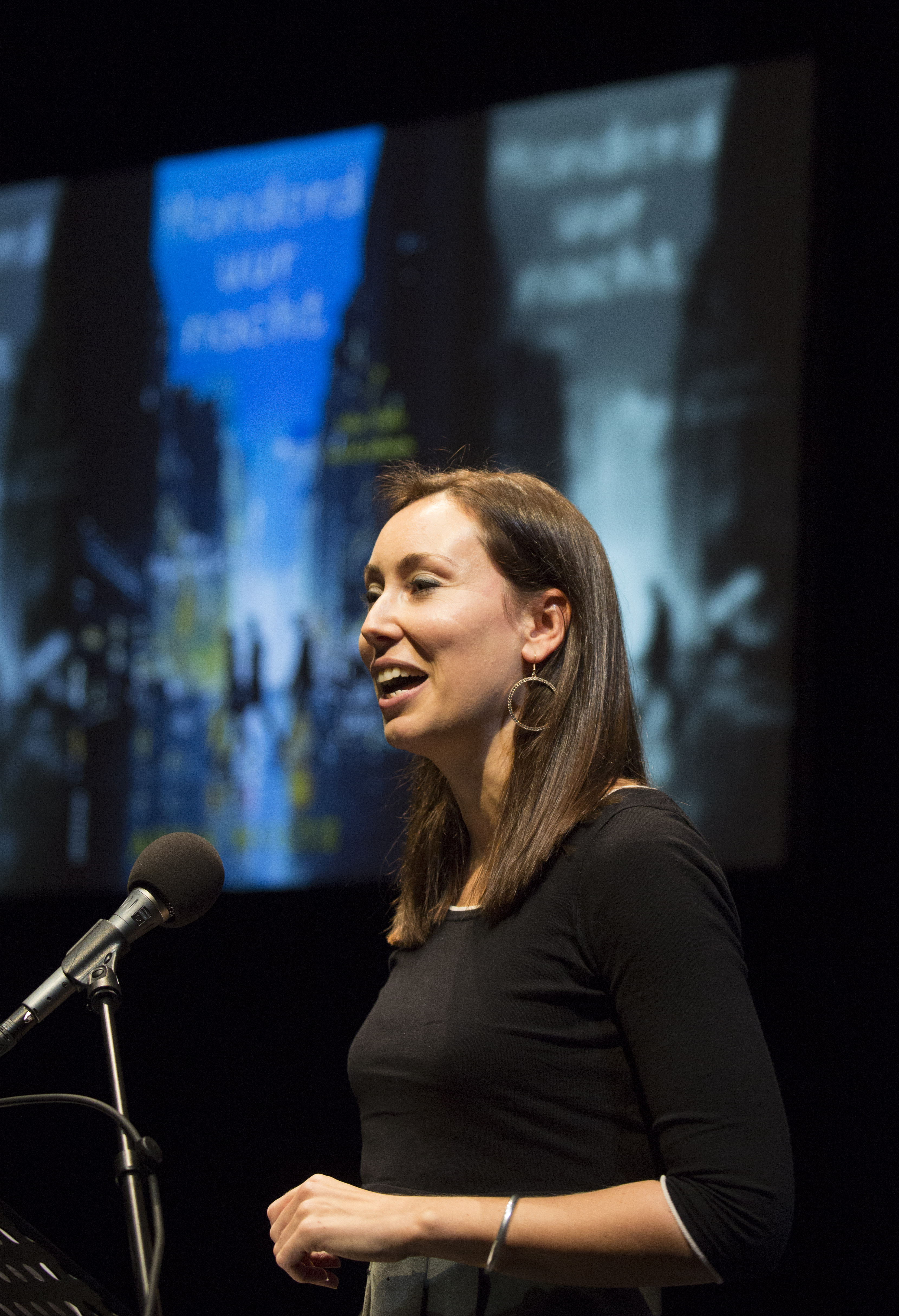 Anna Woltz - Schrijversfeest - Winternachten 2016 Schrijversfeest Theater aan het Spui, Den Haag, Nederland